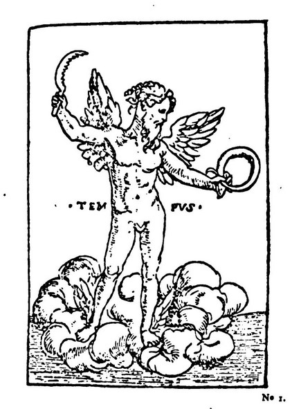 Printer's mark of Michiel Hillen van Hoochstraten.